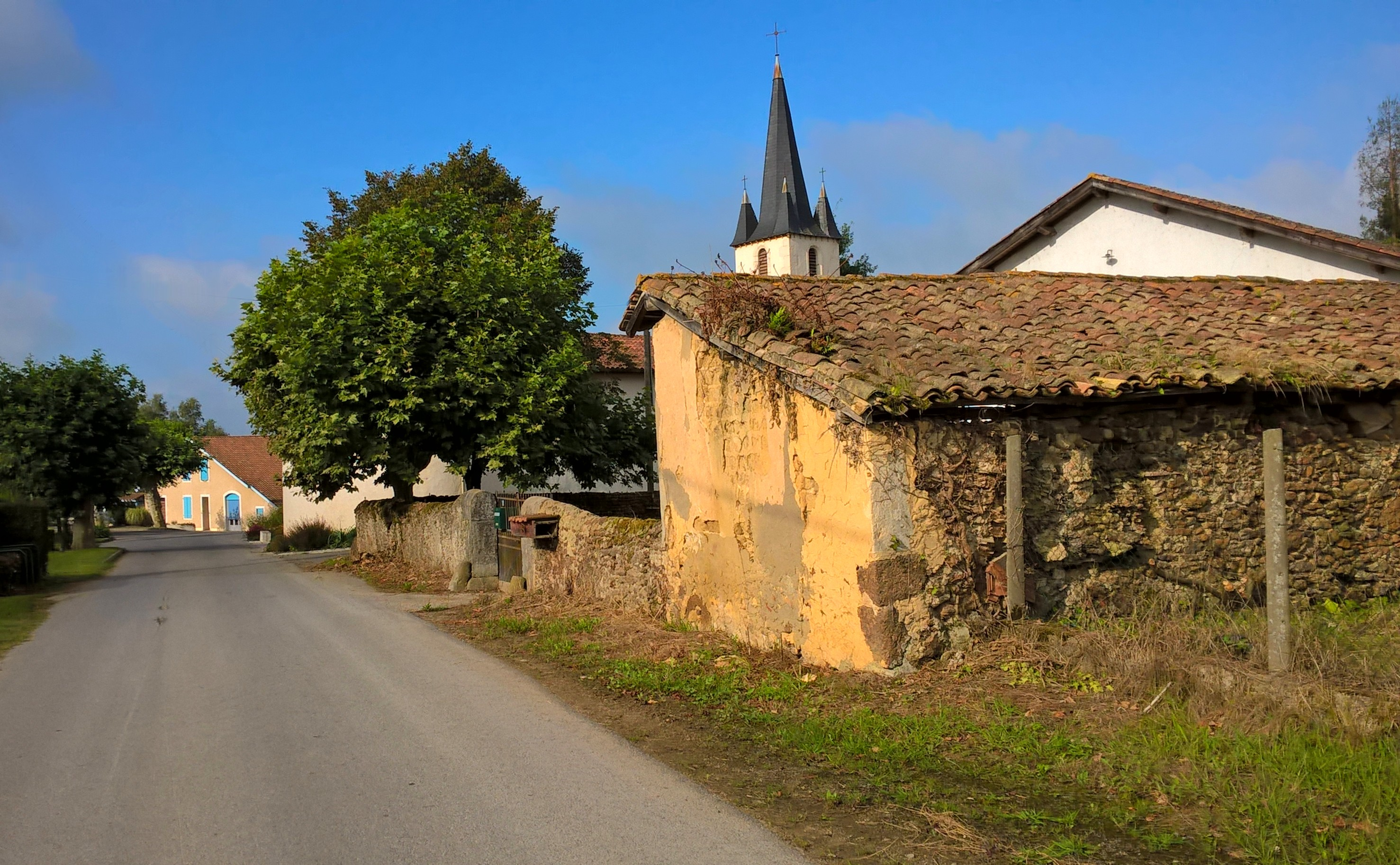 Bourg St-Girons en Béarn, architecture chalosaise